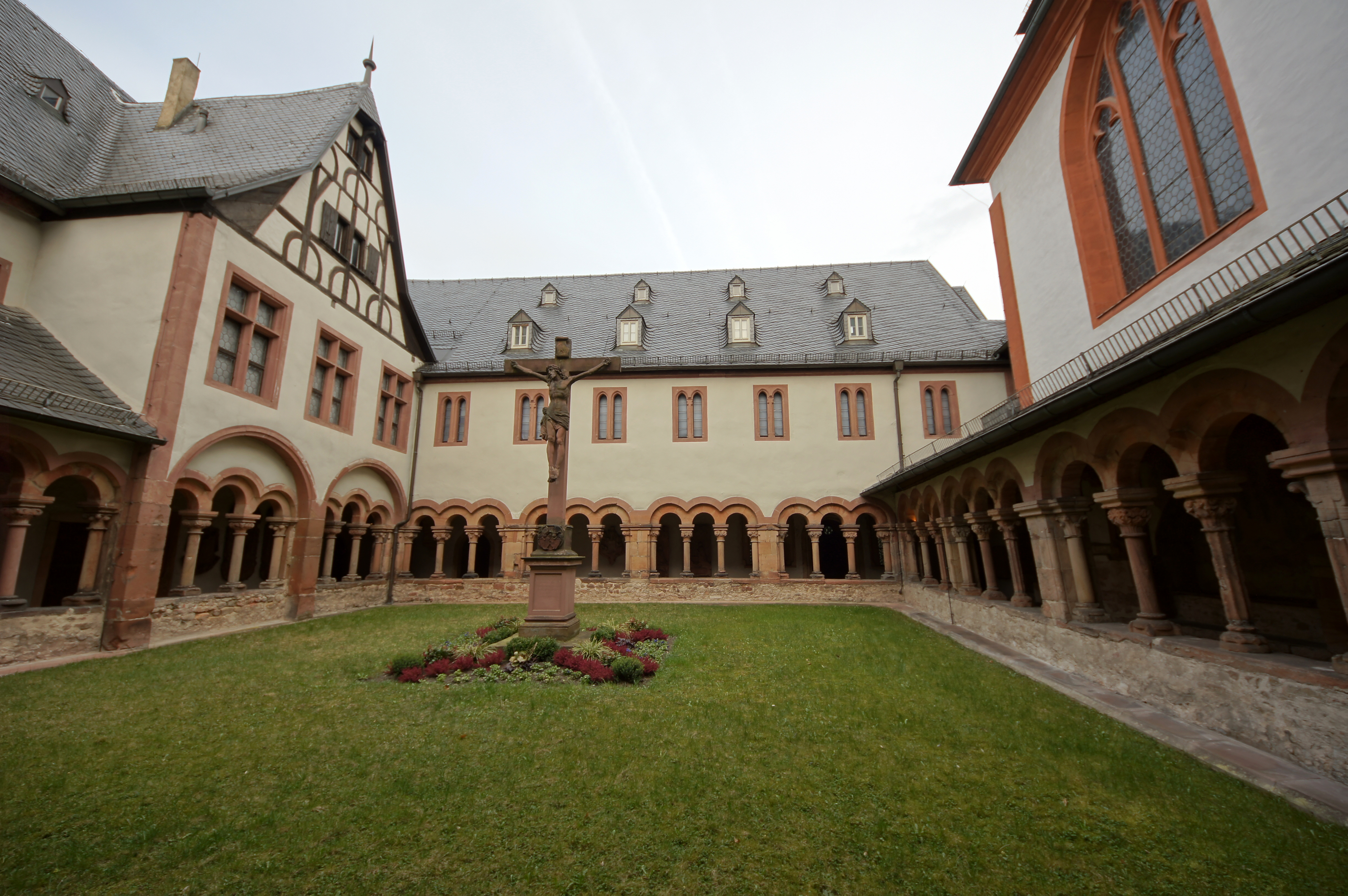 2011-03-26 Aschaffenburg 094 Stiftskirche St. Peter und Alexander, romanischer Kreuzgang.jpg